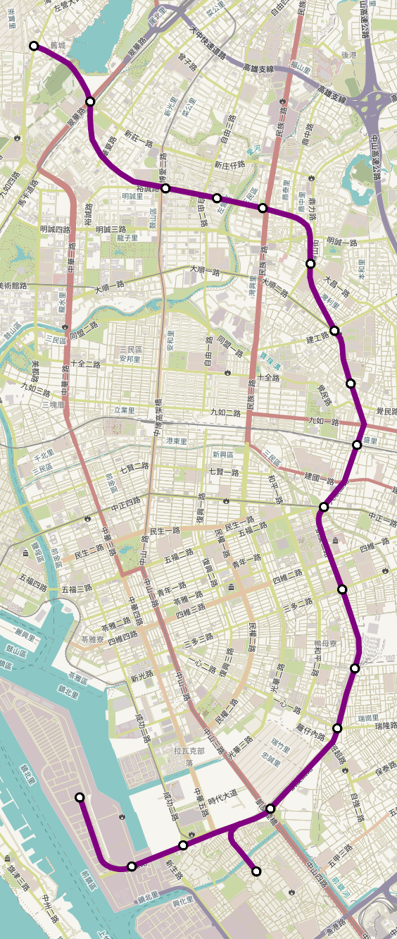 1984年運委會規劃的高雄捷運中運量紫線